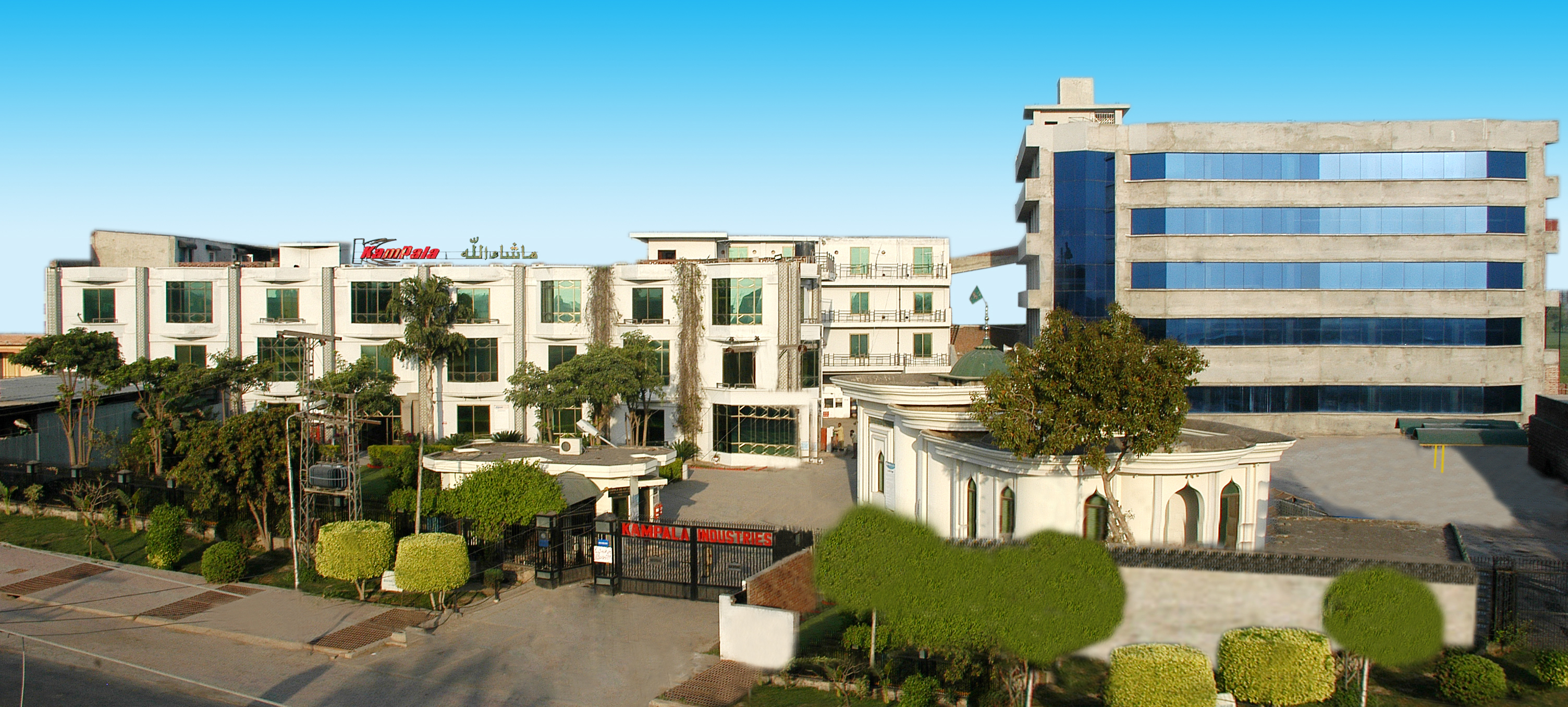 Kampala Industries (PVT) Ltd, Khitchian, Sialkot